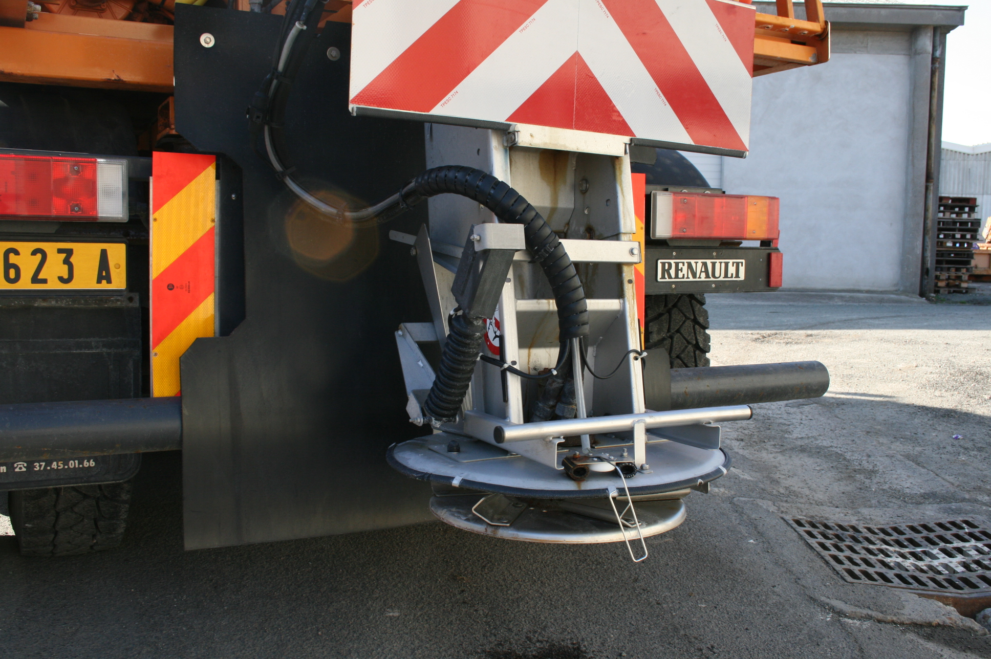 Disque d'épandage une épandeuse (outil de répandage du sel pour le déneigement des routes)